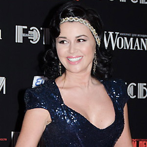 Анастасия Заворотнюк на премьере фильма «Великий Гэтсби». 2013 год